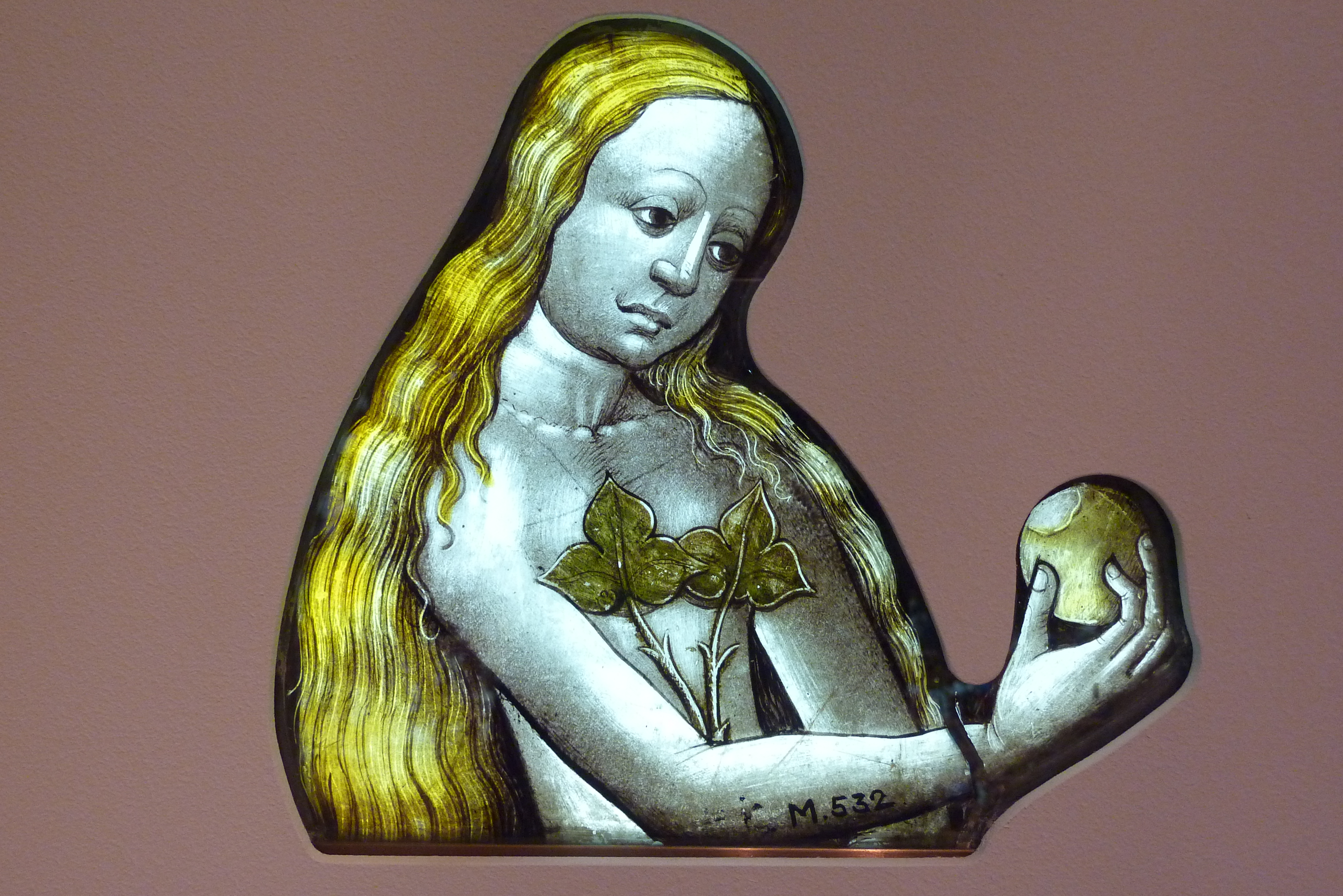 Bleiglasfenster im Museum Schnütgen in Köln, Darstellung: „Eva“, Köln um 1450 bis 1460, Inventar-Nr.: M 532. siehe: Brigitte Lymant: Die Glasmalereien des Schnütgen-Museums. Schnütgen-Museum, Köln 1983